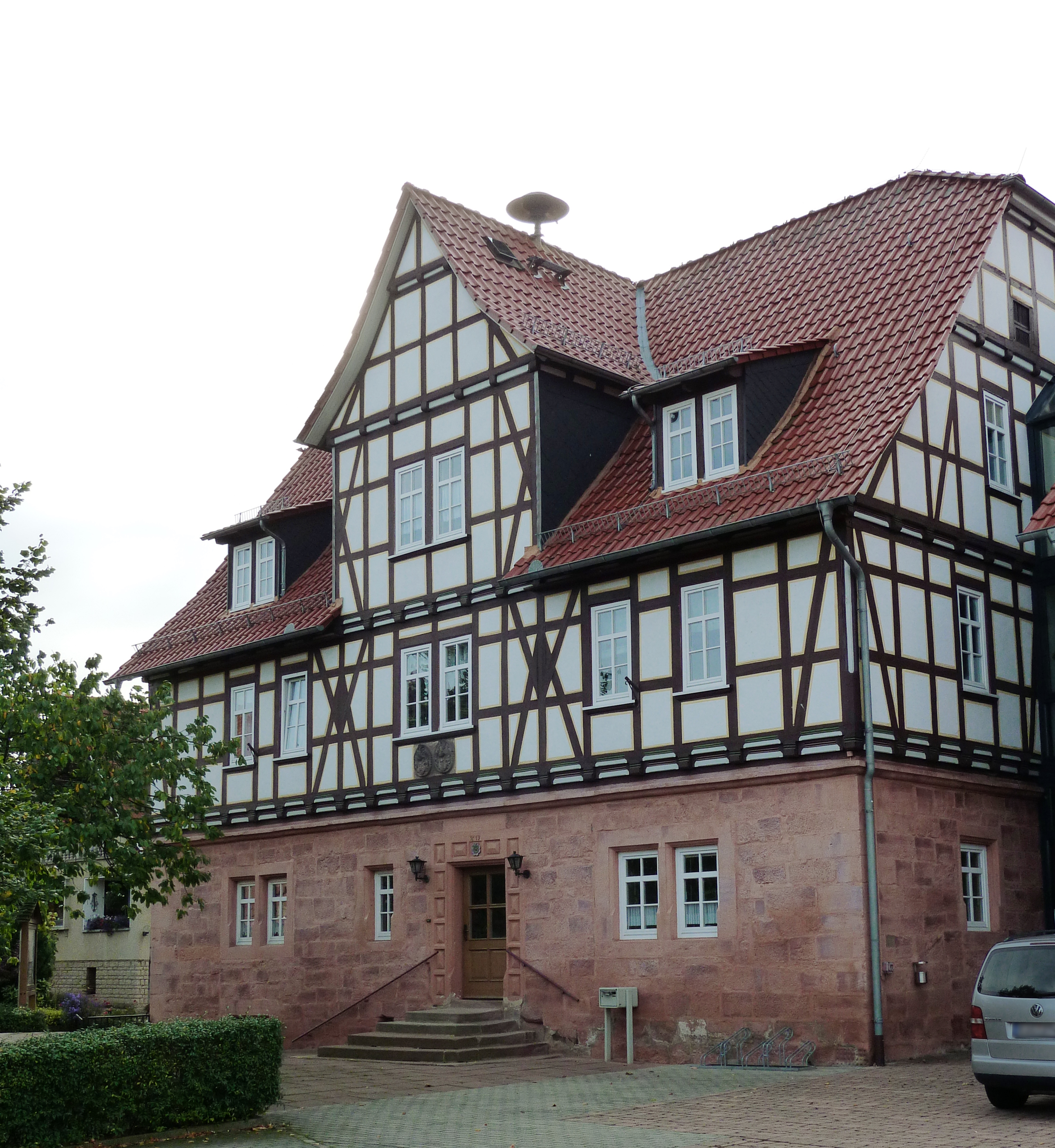 Ehemaliger Hansteinscher Gutshof in Hohengandern (Landkreis Eichsfeld), inschriftlich datiert 1619 (Wappenstein: 1621). Heute Sitz der Verwaltungsgemeinschaft Hanstein-Rusteberg